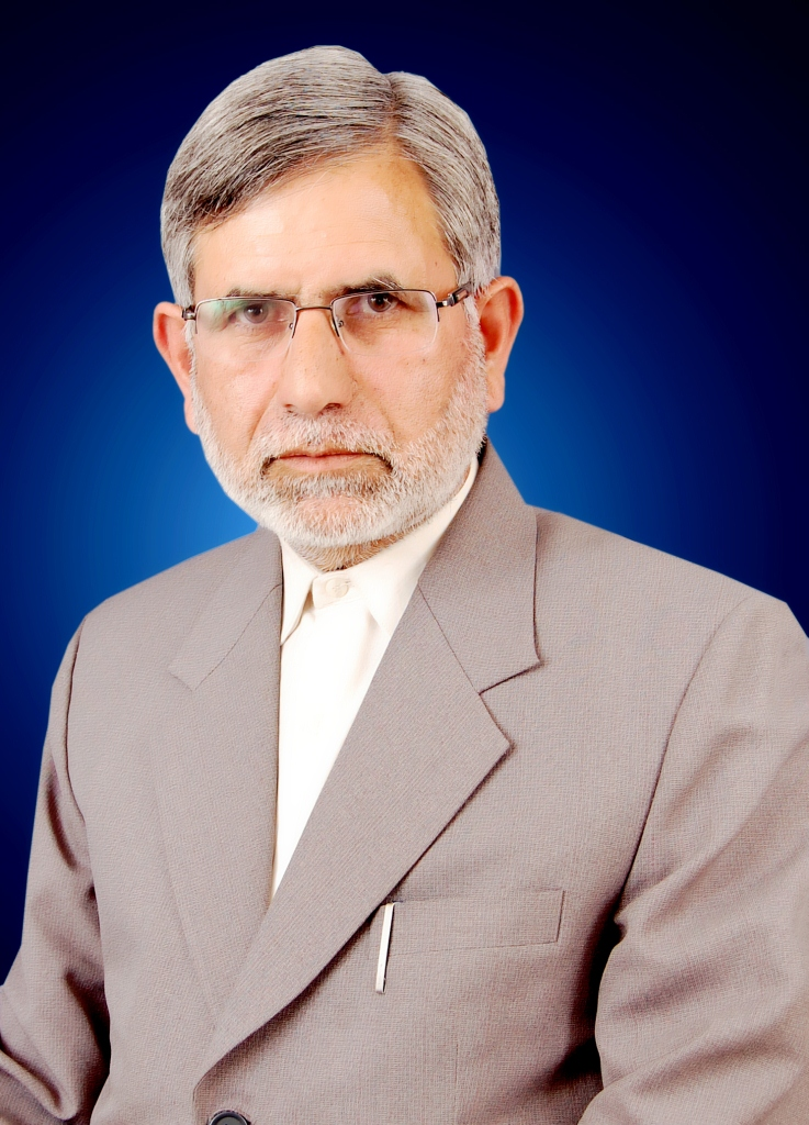 Dr. Sheikh Showkat Hussain